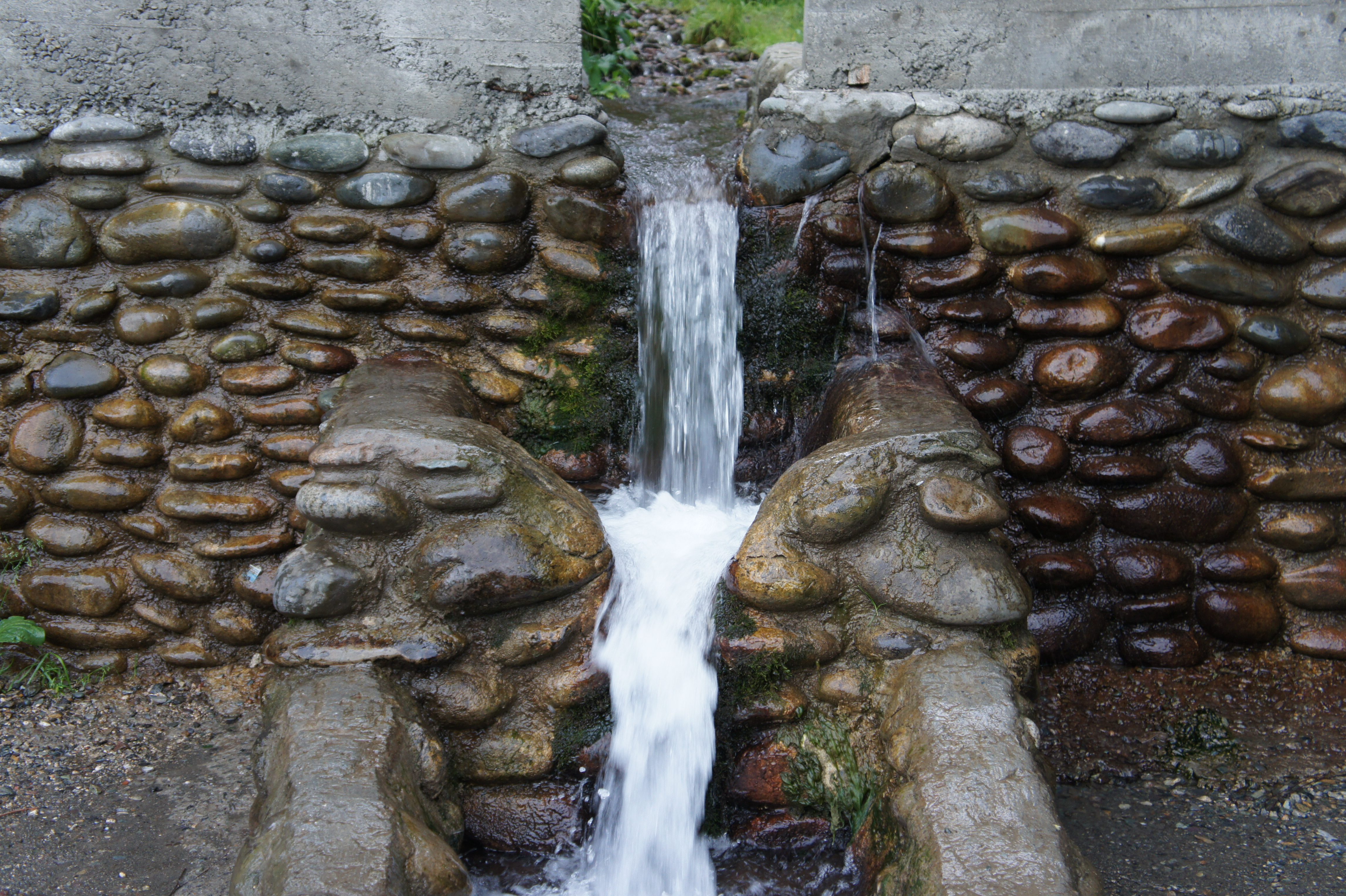 источник Аржан-Суу, Майминский район Республики Алтай